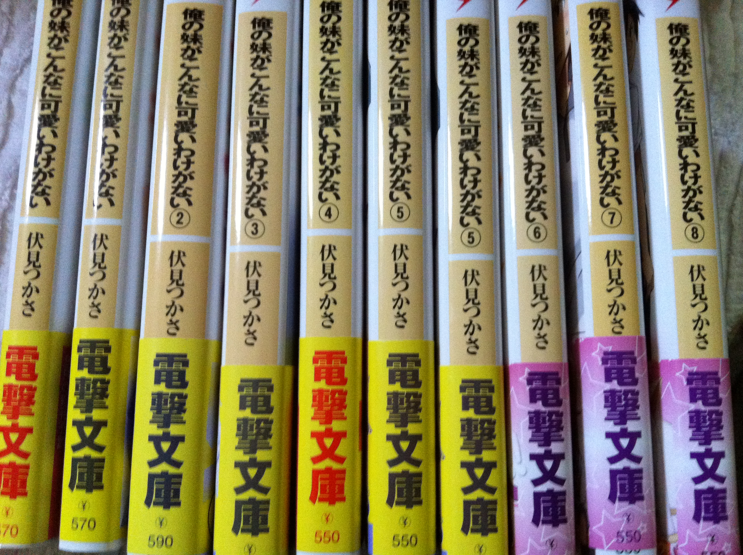 《我的妹妹哪有這麼可愛！》電擊文庫輕小說版。